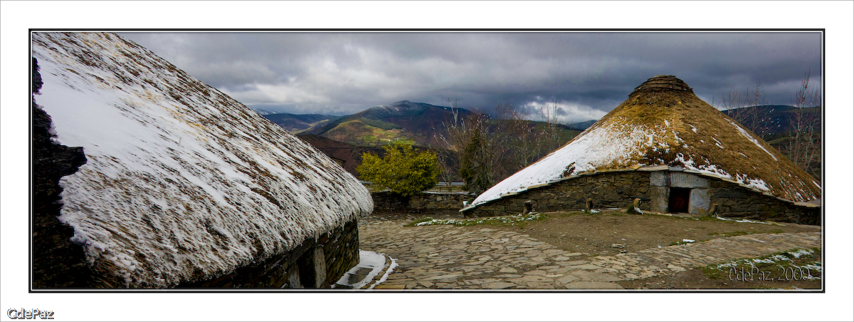 Pallozas con neve no Cebreiro. Imaxe creada a partir de 2 tomas.